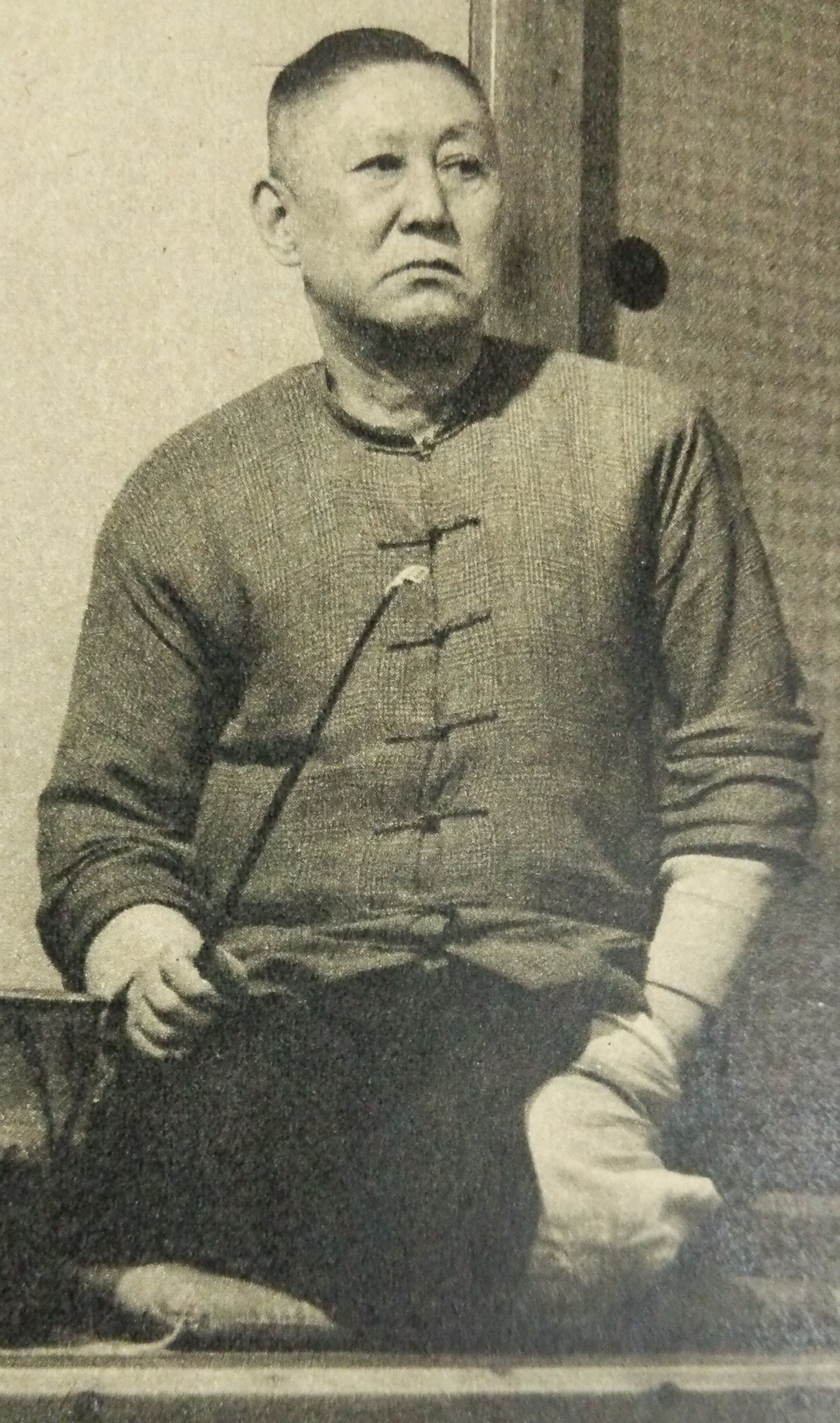 内田百間